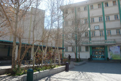 محوطه دانشکده مهندسی صنایع تهران جنوب